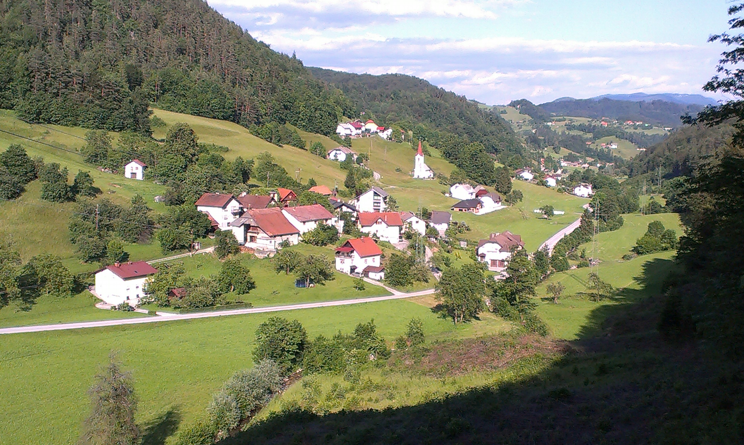 Vas Rove, občina Zagorje ob Savi